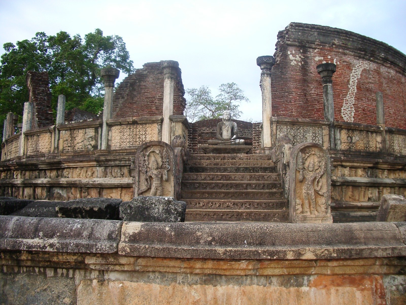 Temple a Polonnaruwa; foto feta per J. Ollé el juliol del 2006